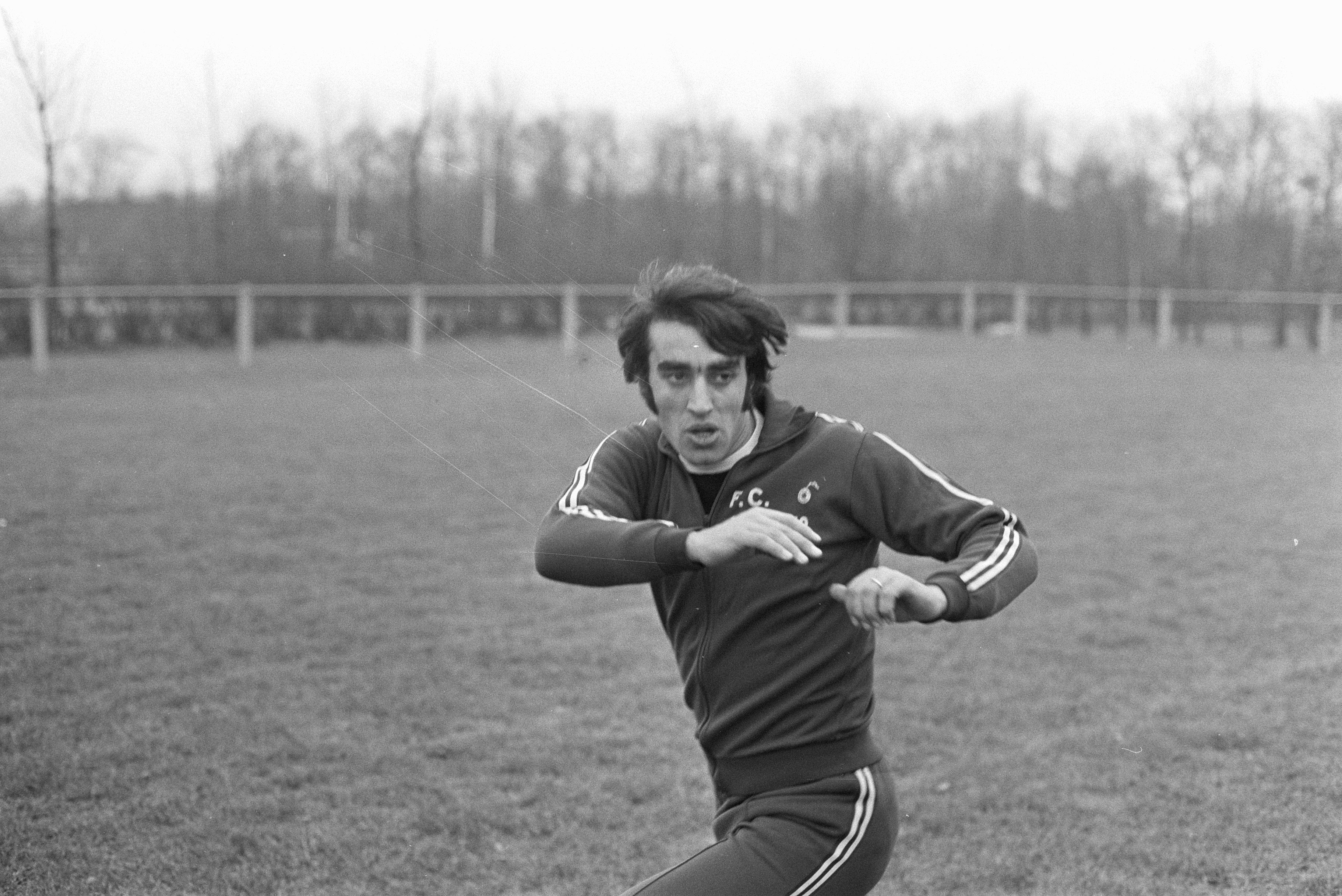 Voetbalclub Juventus (Italie) traint in Enschede; Pietro Anastasi.